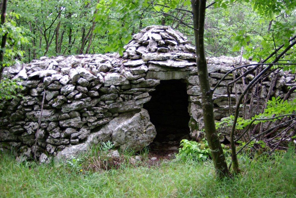 Pastirska hiška